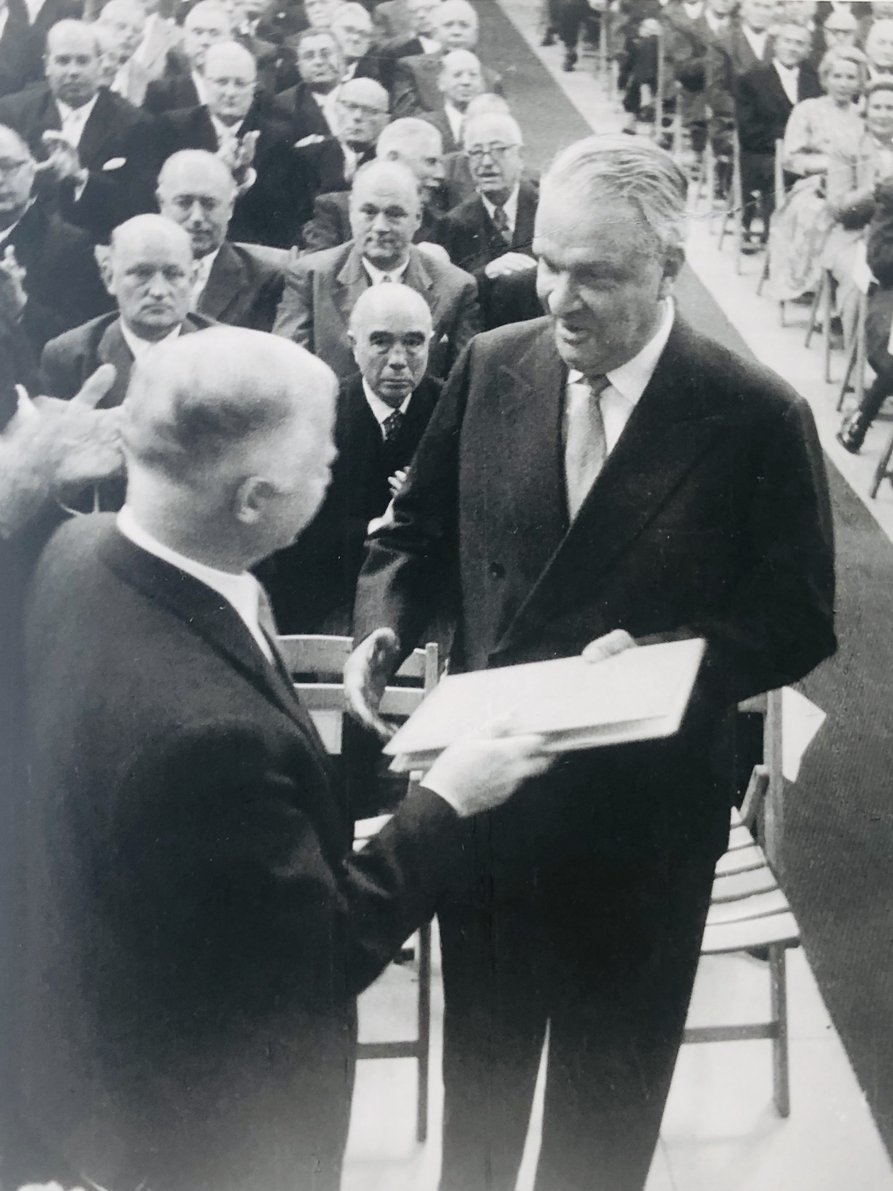 Otto Stürken mit Kurt Sieveking beim Festakt zum 100jährigen Bestehen der Vereinsbank in Hamburg 1956